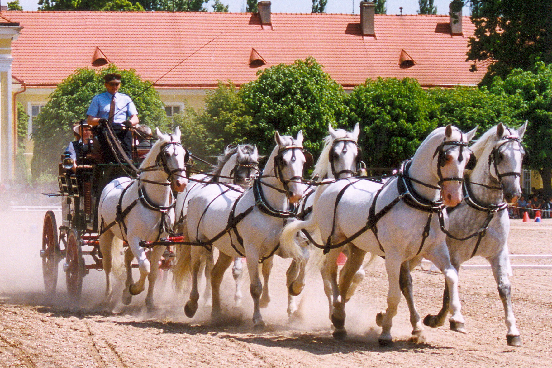 Kladrubské šestispřeží